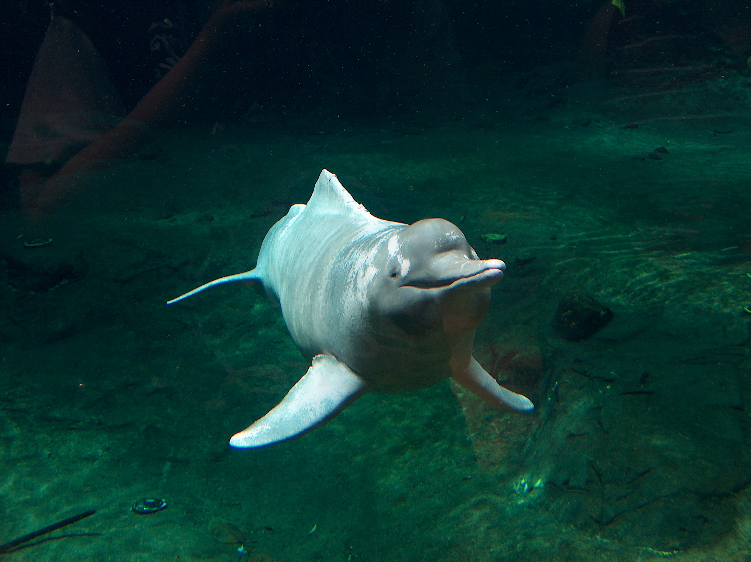 Amazonas-Flussdelfin: Orinoko im Zoo Duisburg